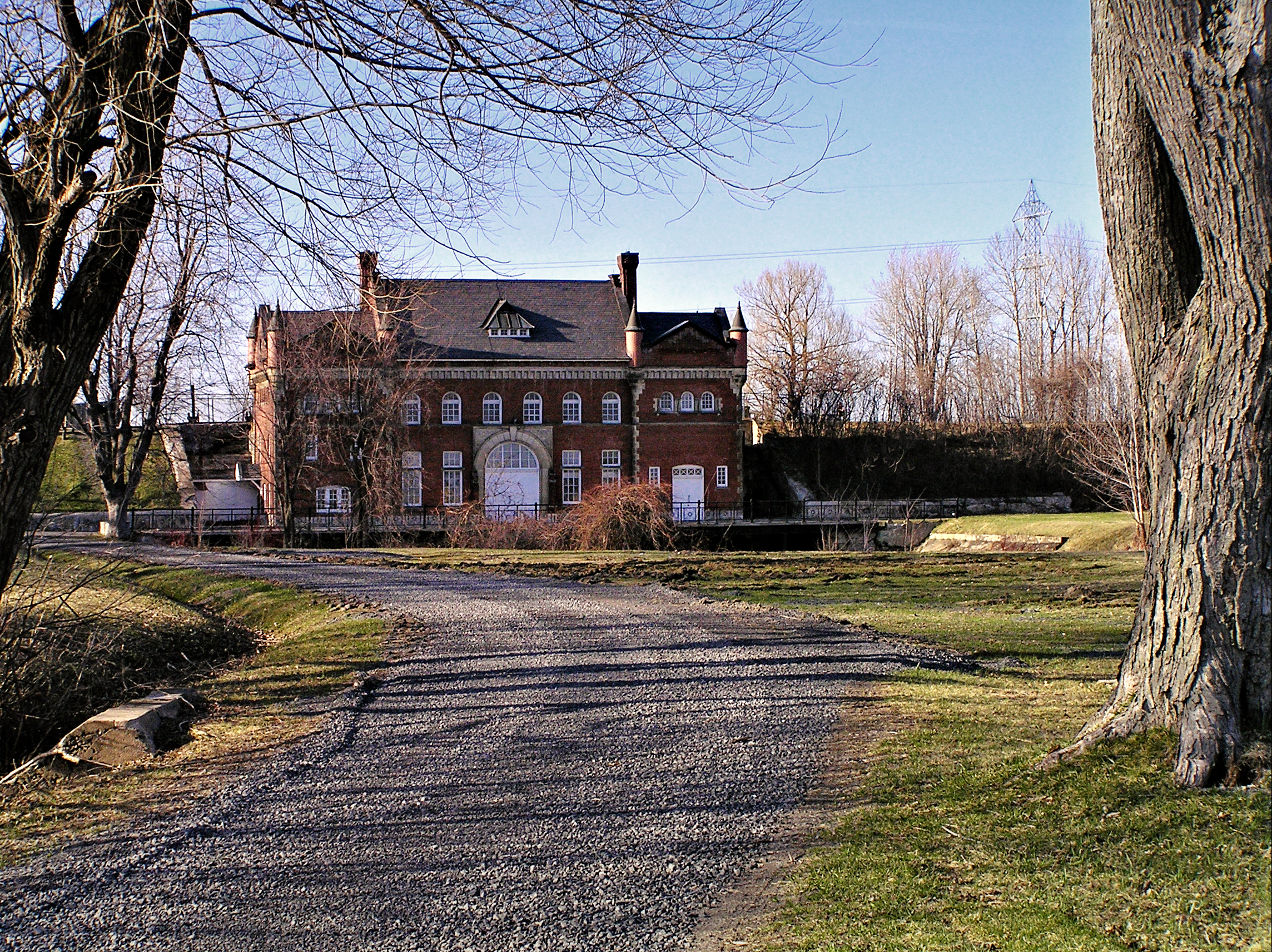 Les Cèdres (Québec) - Le petit pouvoir